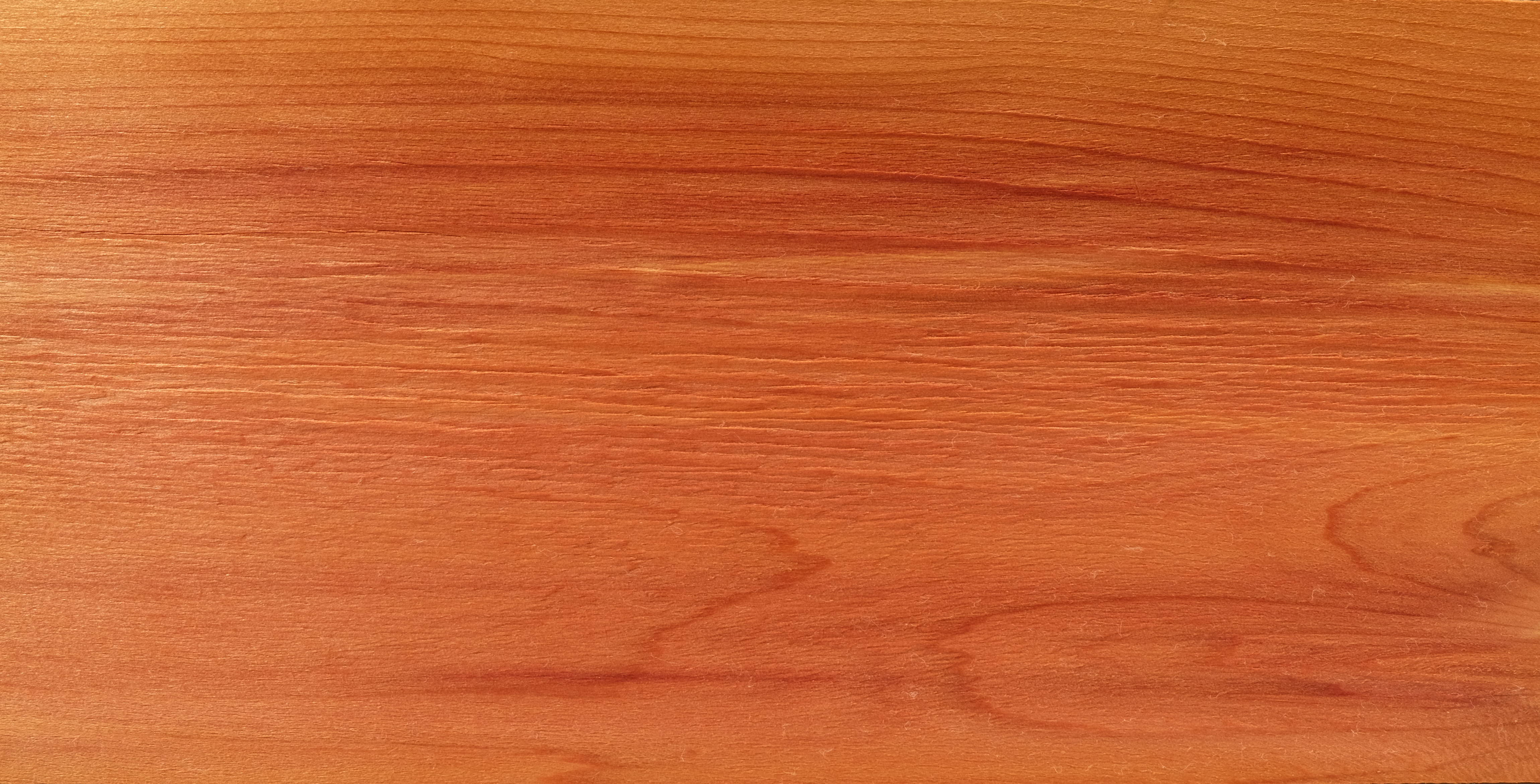 gemessertes Furnier; Holzart: BVI, Bleistiftzeder, Virgin. Wacholder, Eastern red cedar, pencil cedar